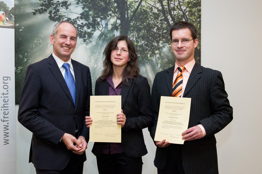 Wolf-Erich-Kellner-Preis Verleihung 2012. Klara Deecke und Marko Kreutzmann, Laudator Prof. Joachim Scholtyseck